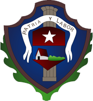 Dibujo del Escudo e Cabaiguán